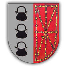 Armas de Ayanz de Navarra. De plata con tres calderas de sable puestas en palo: partido de las armas de Navarra.